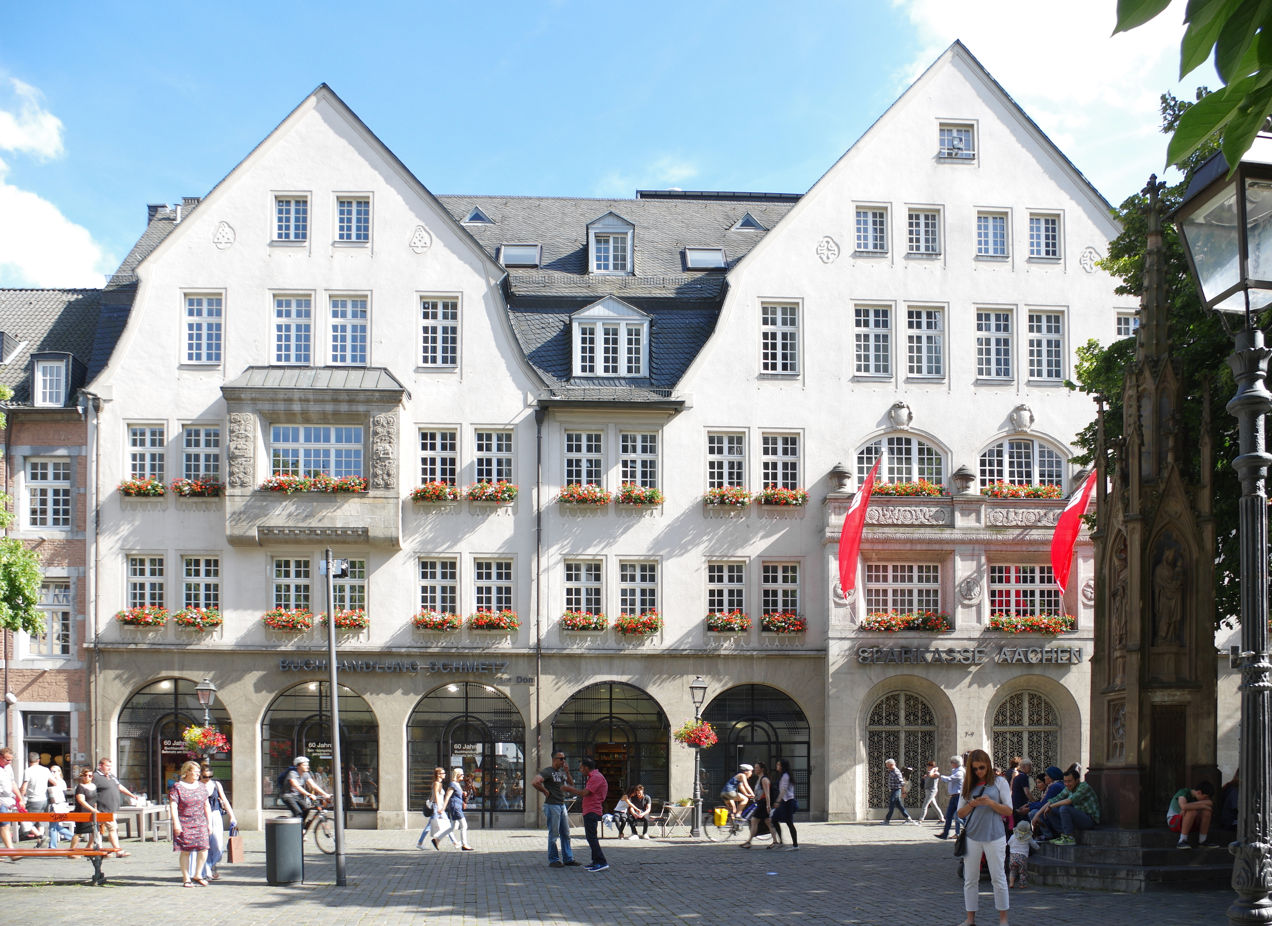 Aachen, Münsterplatz 7-9